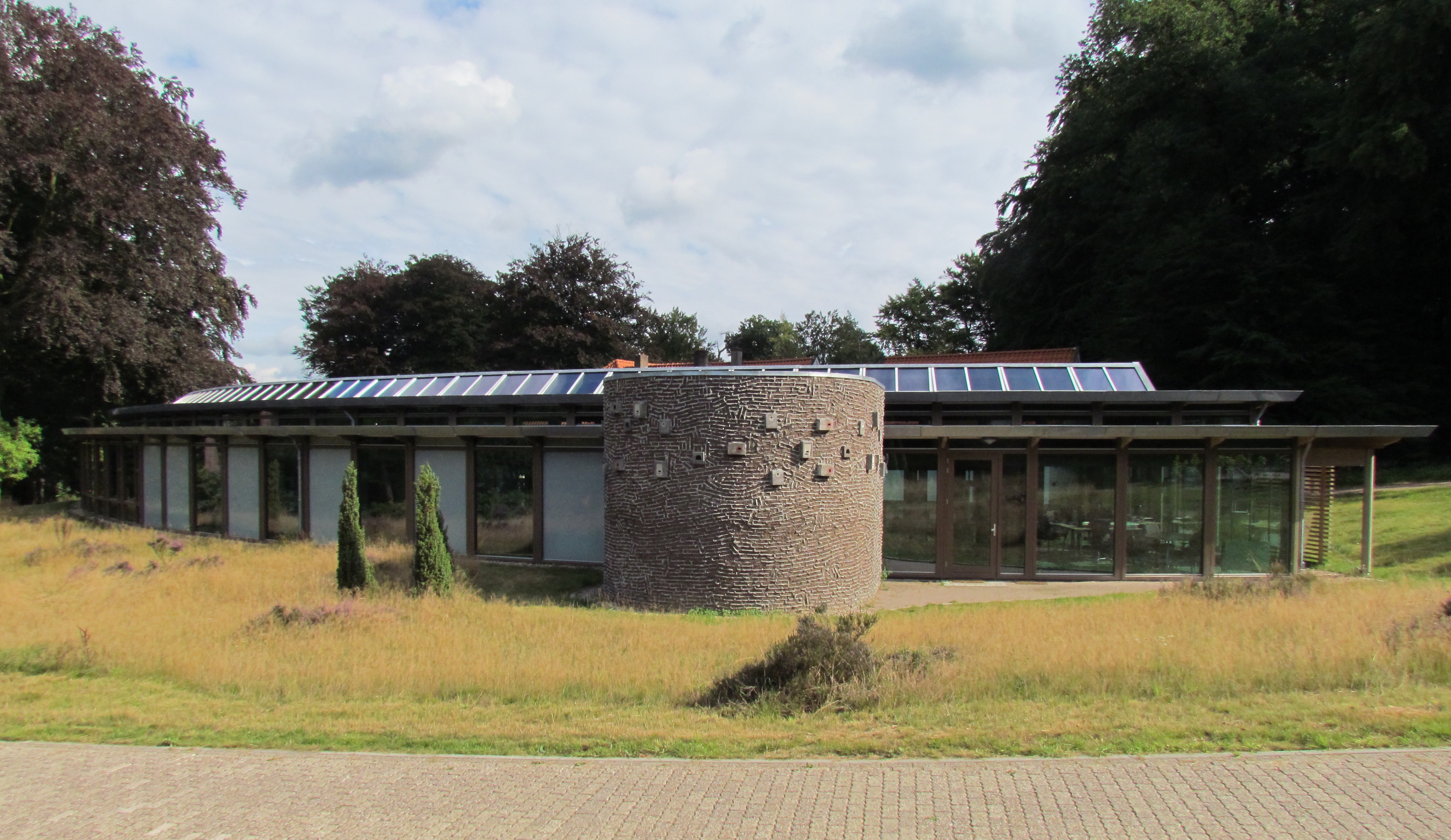 Kantoor Staatsbosbeheer, district Veluwe ('Boskantoor'). Locatie: Ugchelseberg, Otterloseweg bij Ugchelen, NL. Architect: Jón Kristinsson